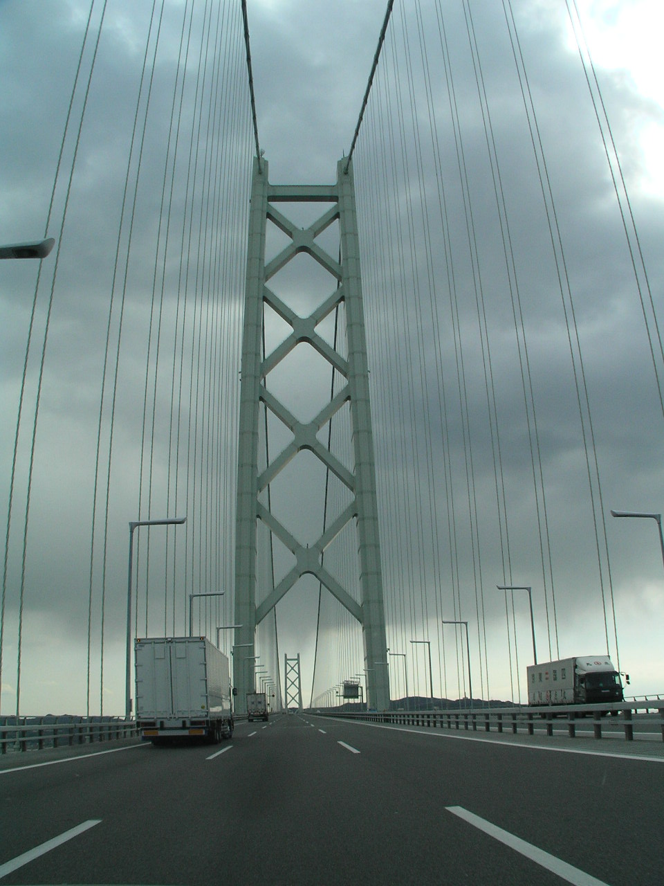 明石海峡大橋（あかしかいきょうおおはし）は、兵庫県神戸市垂水区東舞子町と淡路市岩屋とを結ぶ、明石海峡を横断して架けられた世界最長の吊り橋である。